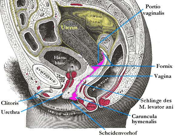 Vagusgruppe, Image:Gray1166.png, nachbearbeitet und Beschriftung modifiziert (Deutsch/german) von Benutzer:Uwe Gille